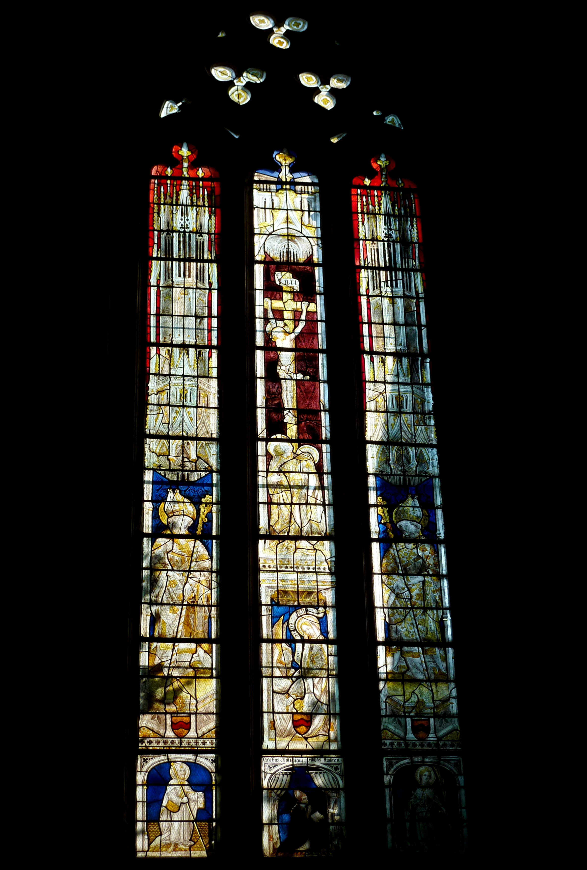 Ehemalige Abteikirche Notre-Dame in Ambronay, einer Gemeinde im Département Ain in der französischen Region Rhône-Alpes, Chorfenster aus dem 15. Jahrhundert